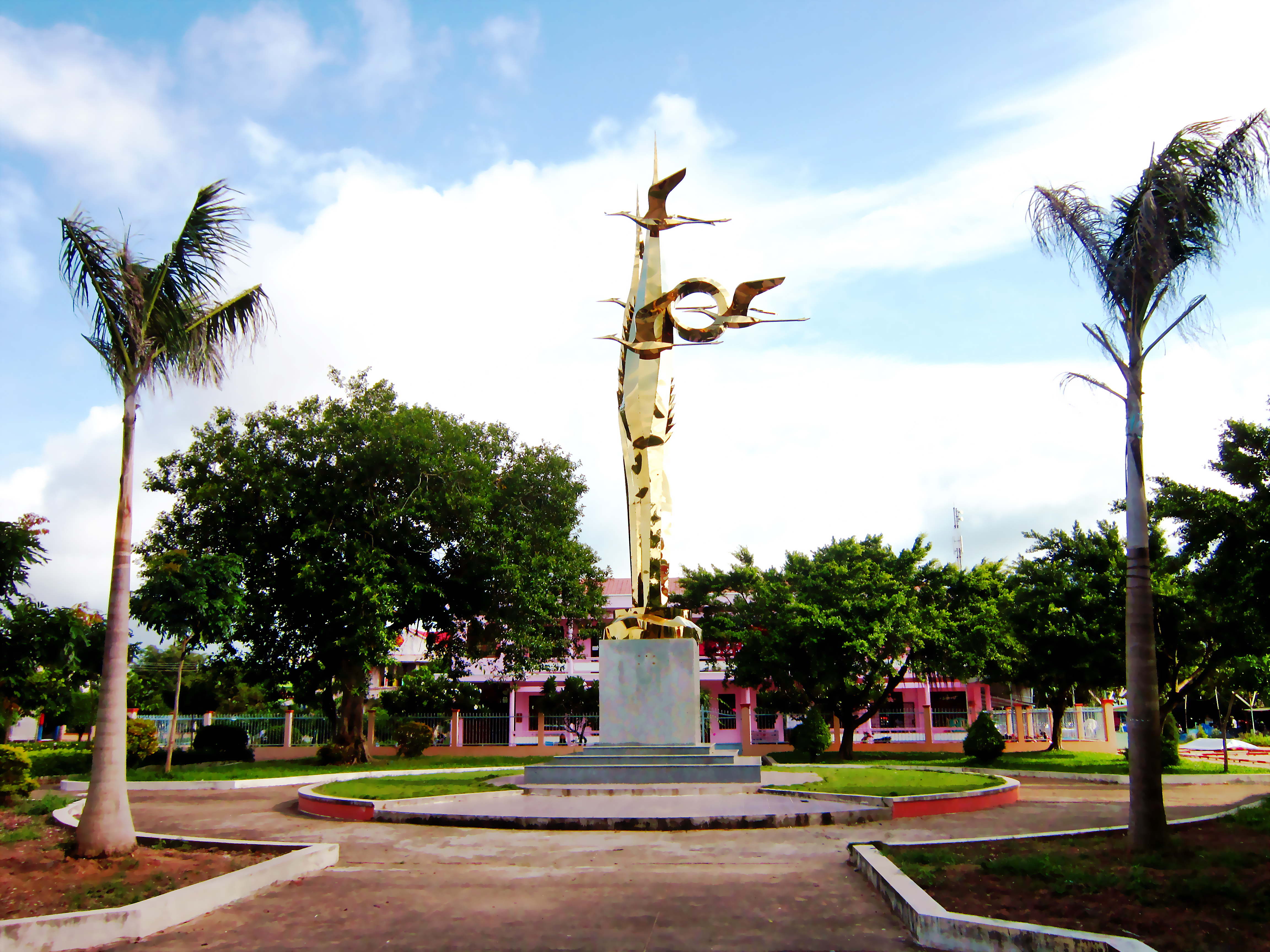 Tượng đài Bông lúa ở công viên thị trấn An Châu, thuộc huyện Châu Thành, tỉnh An Giang, Việt Nam.